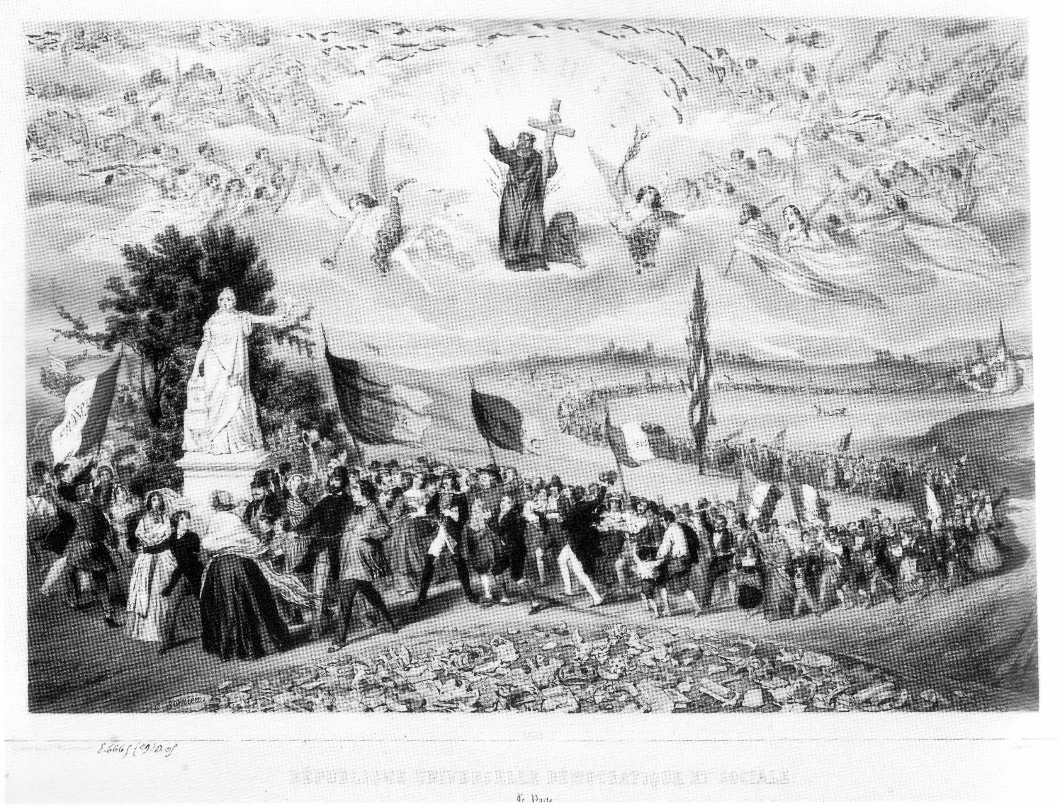 Lithographie, 1848. Die demokratische und soziale Weltrepublik (République universelle, démocratique et sociale).